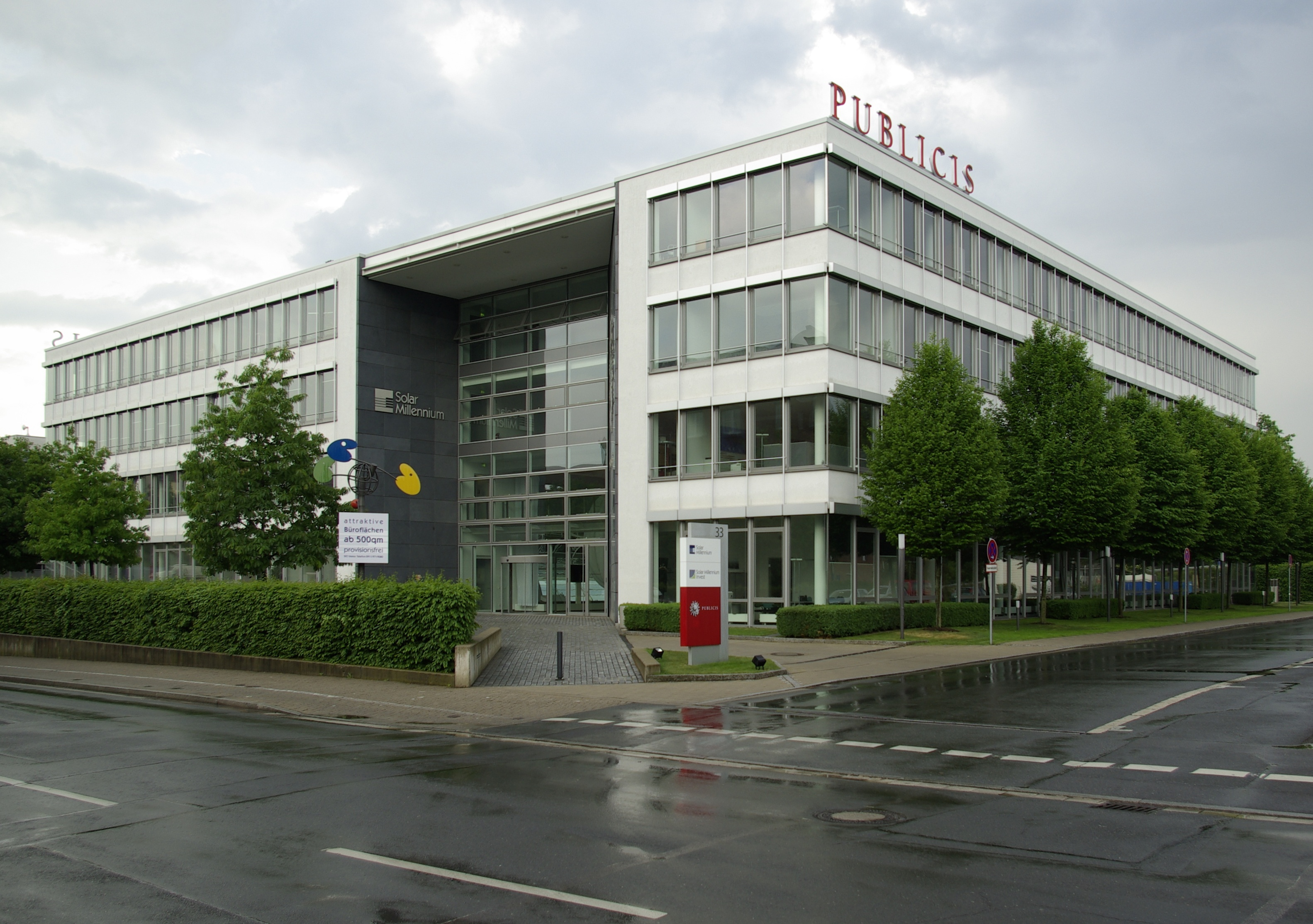 Hauptsitz der Solar Millennium und eine deutsche Niederlassung von Publicis Groupe in der Nägelsbachstraße 33 in Erlangen